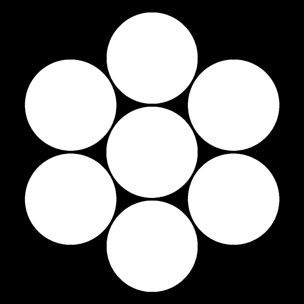 七曜